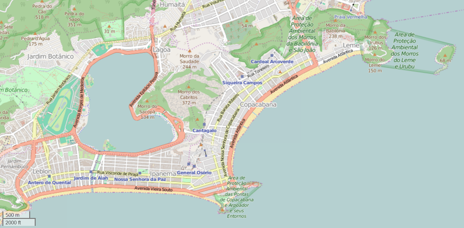 中文（香港）: 2016年夏季奧林匹克運動會男子10公里公開水域游泳比賽